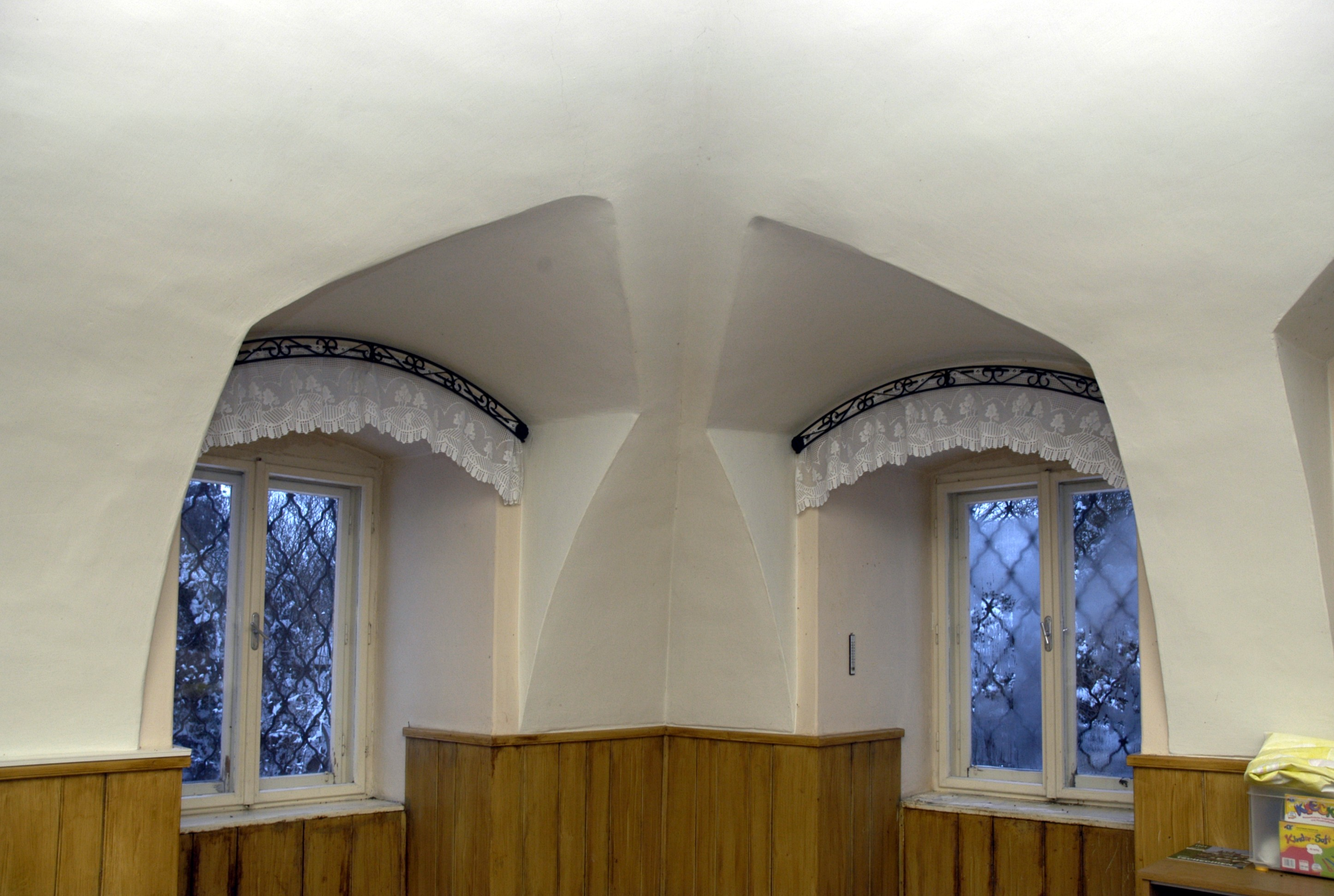 Gewölbe im ehemaligen Wasserschloss (heute Pfarrhof)